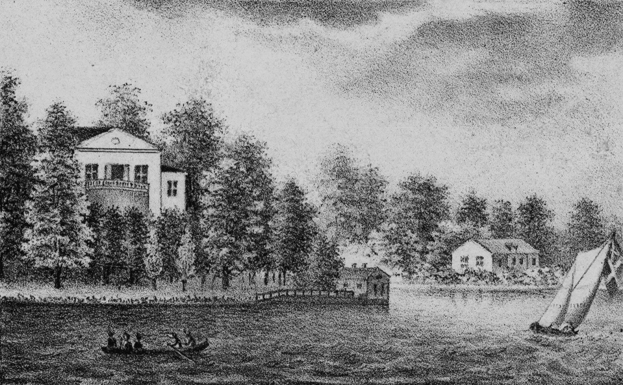 Listonhill och Alnäs på Karta över Kungl. Djurgården